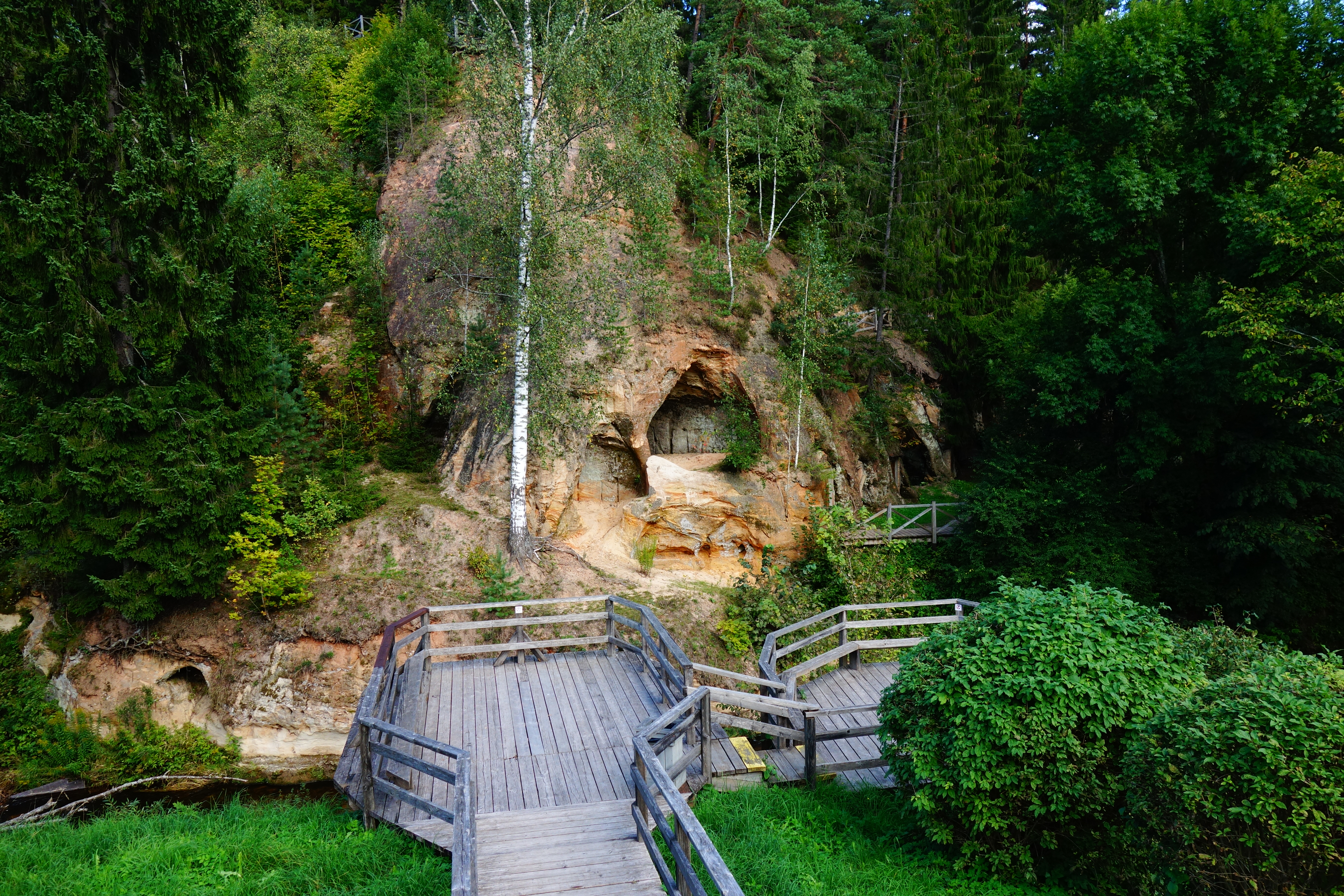 undefined